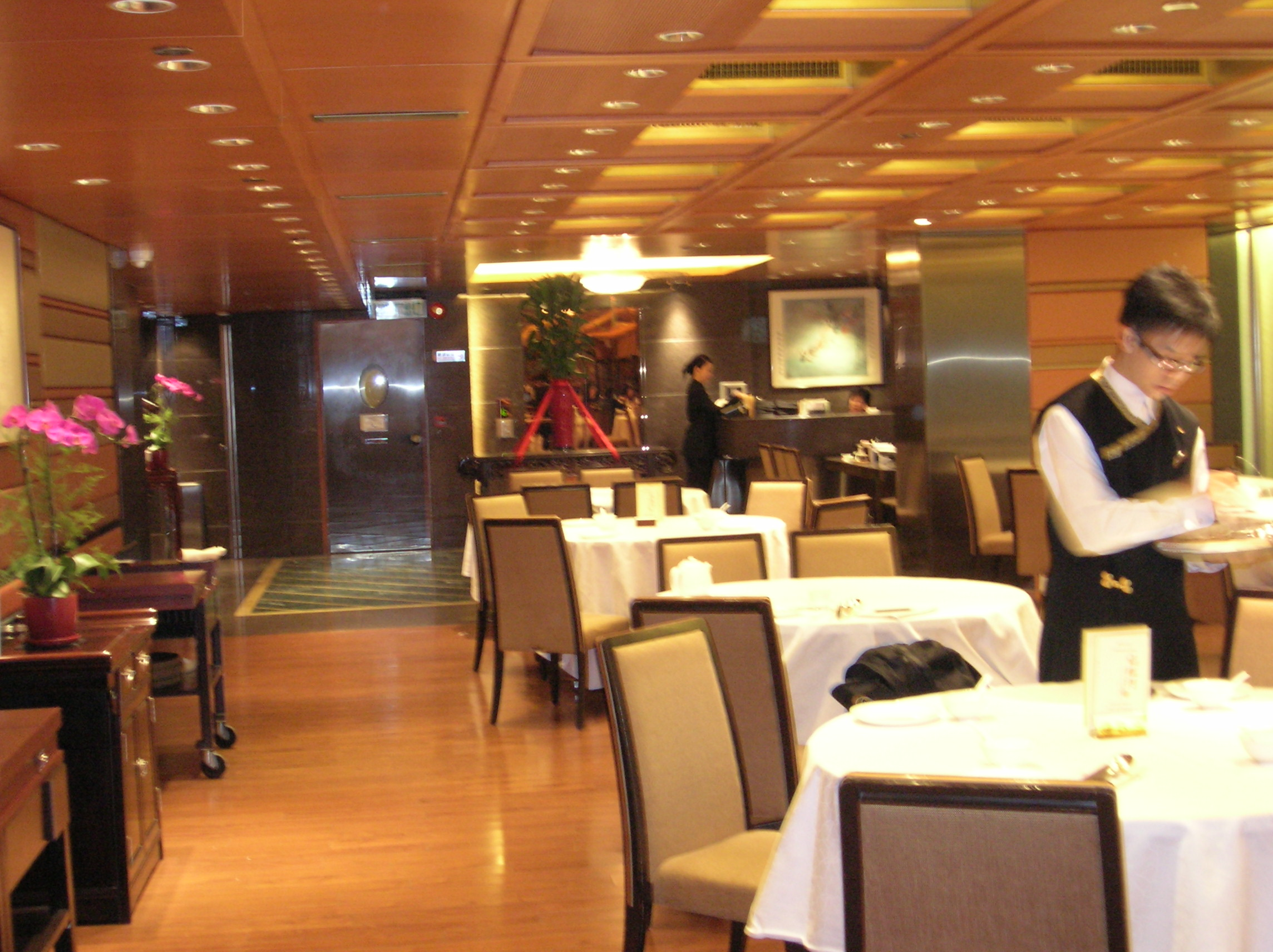 פנים מסעדת פוק לאם מון